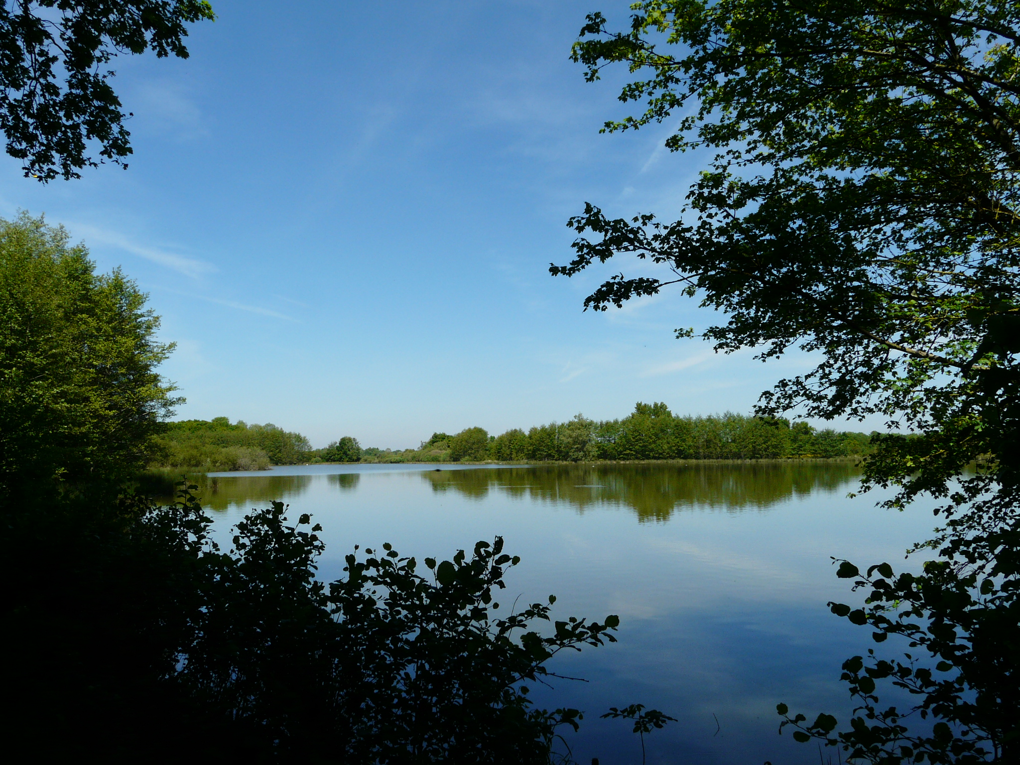 Etang de la Petite Bozonnière